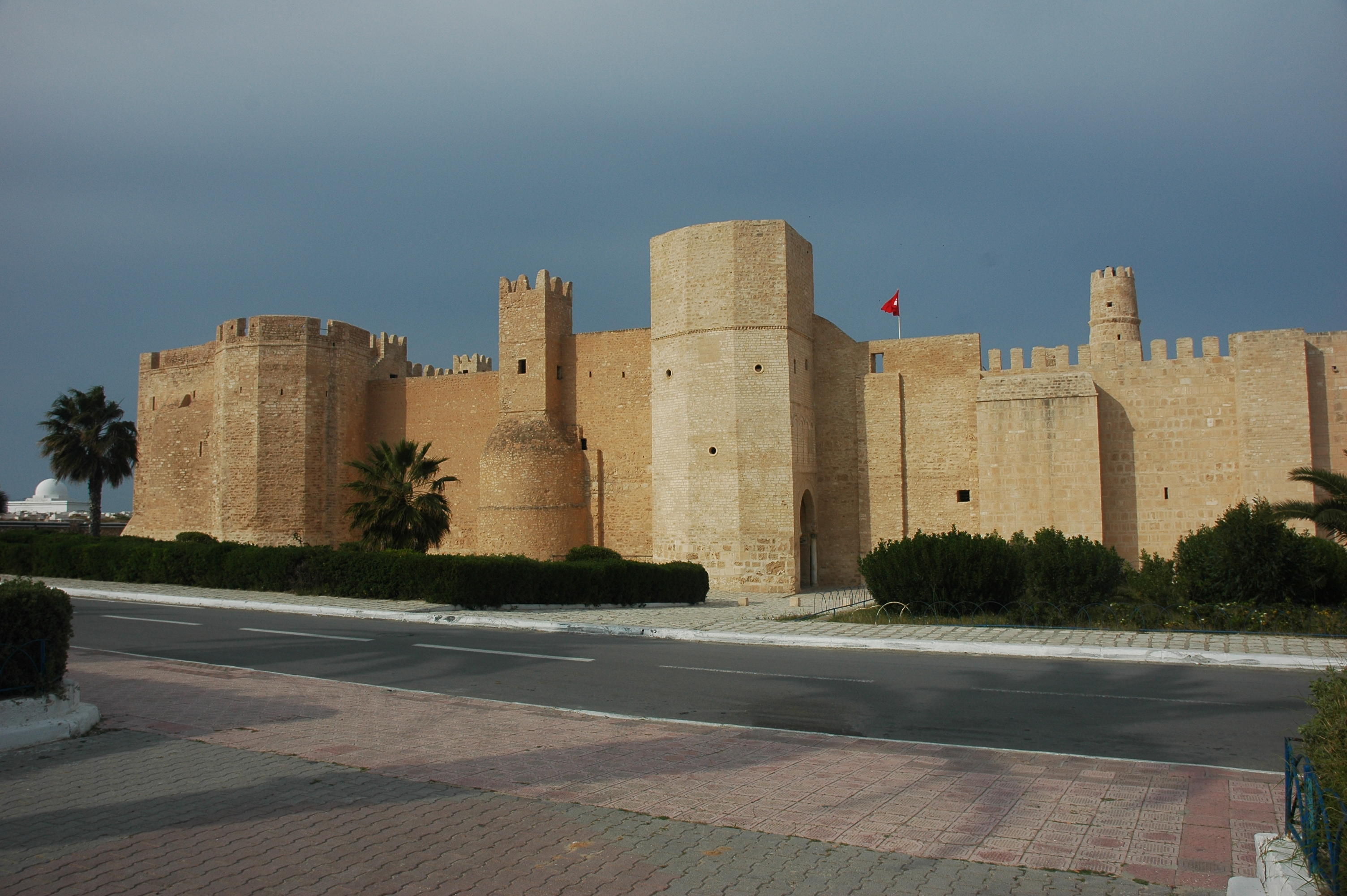 Ribat de Monastir en Tunisie